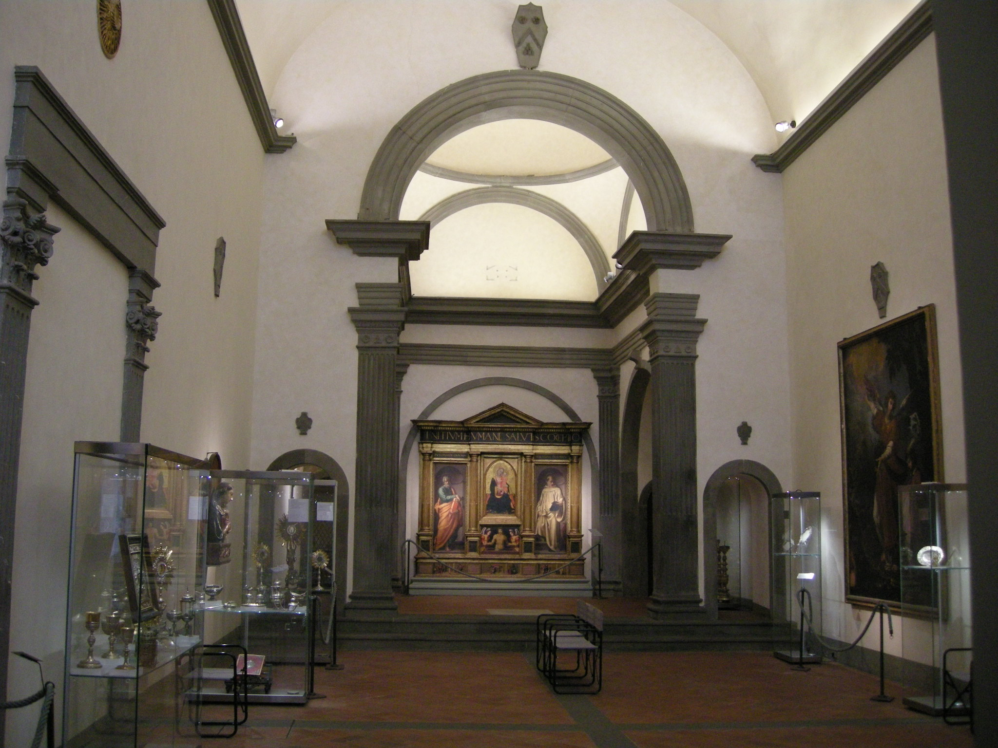 Oratorio dei bini, interno